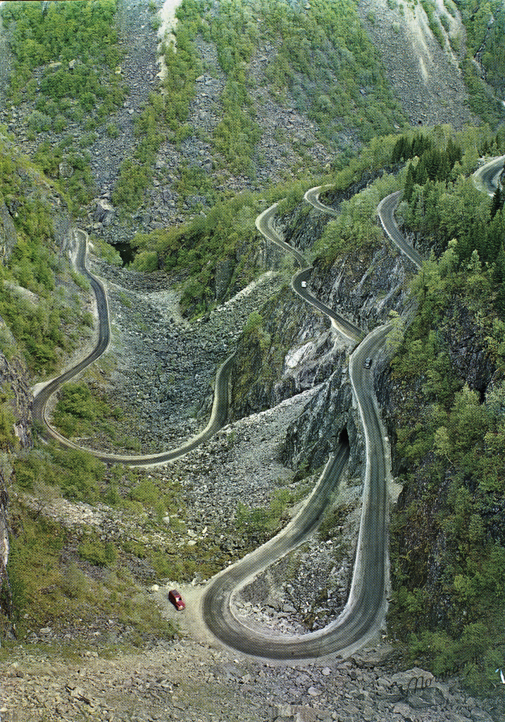 Tittel / Title: Norge: Måbødalen. Ruten Eidfjord - Fossli - Geilo Motiv / Motif: Postkort. Den røde bilen nederst i bildet er en Volvo Duett som tilhørte postkortforlaget. O-48-39 (produksjonsnr fra Normann) Dato / Date: utgitt på slutten av 1960-tallet Fotograf / Photographer: Normann (sannsynligvis Arne W. Normann) Utgiver / Publisher: Normanns kunstforlag Sted / Place: Måbødalen, Hordaland Eier / Owner Institution: Nasjonalbiblioteket / National Library of Norway Lenke / Link: Bildesignatur / Image Number: blds_01774